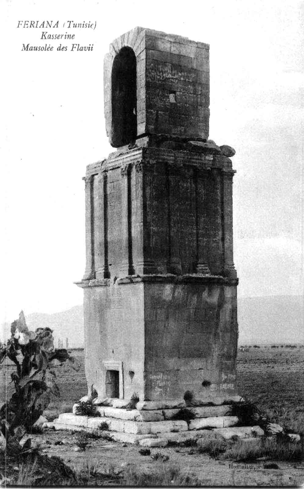 Mausolée des Flavii à Kasserine (et non Fériana comme indiqué)